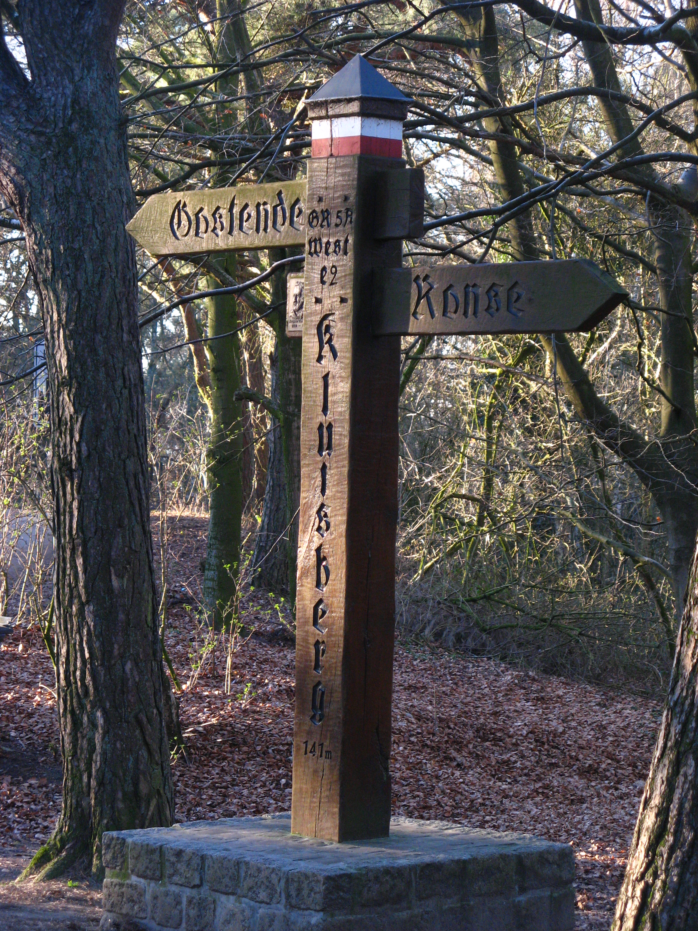 GR Wegwijzer, kluisberg, België